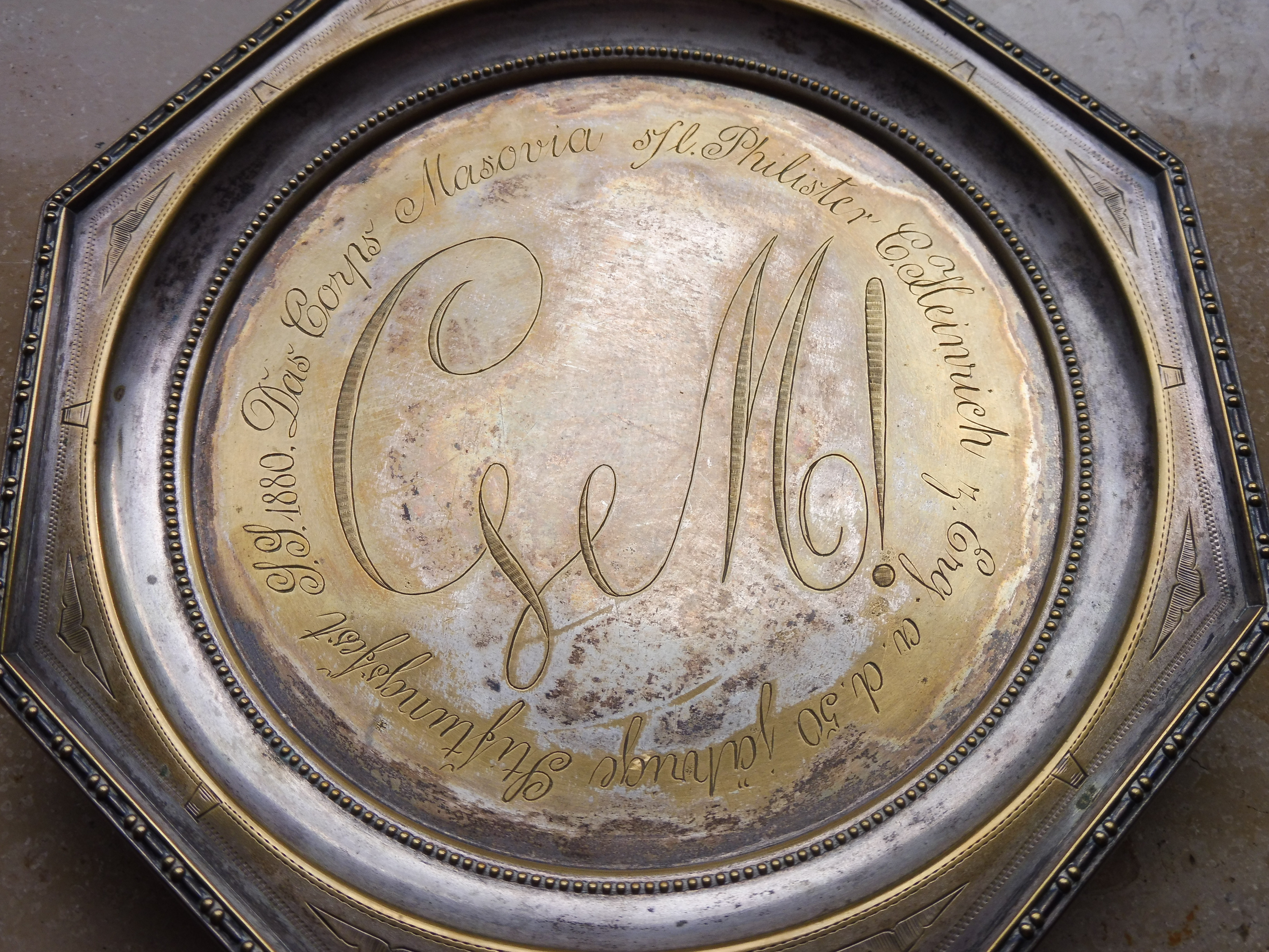 Versilberter Teller mit dem Zirkel des Corps Masovia, dediziert Karl Heinrich beim 50. Stiftungsfest (1880)